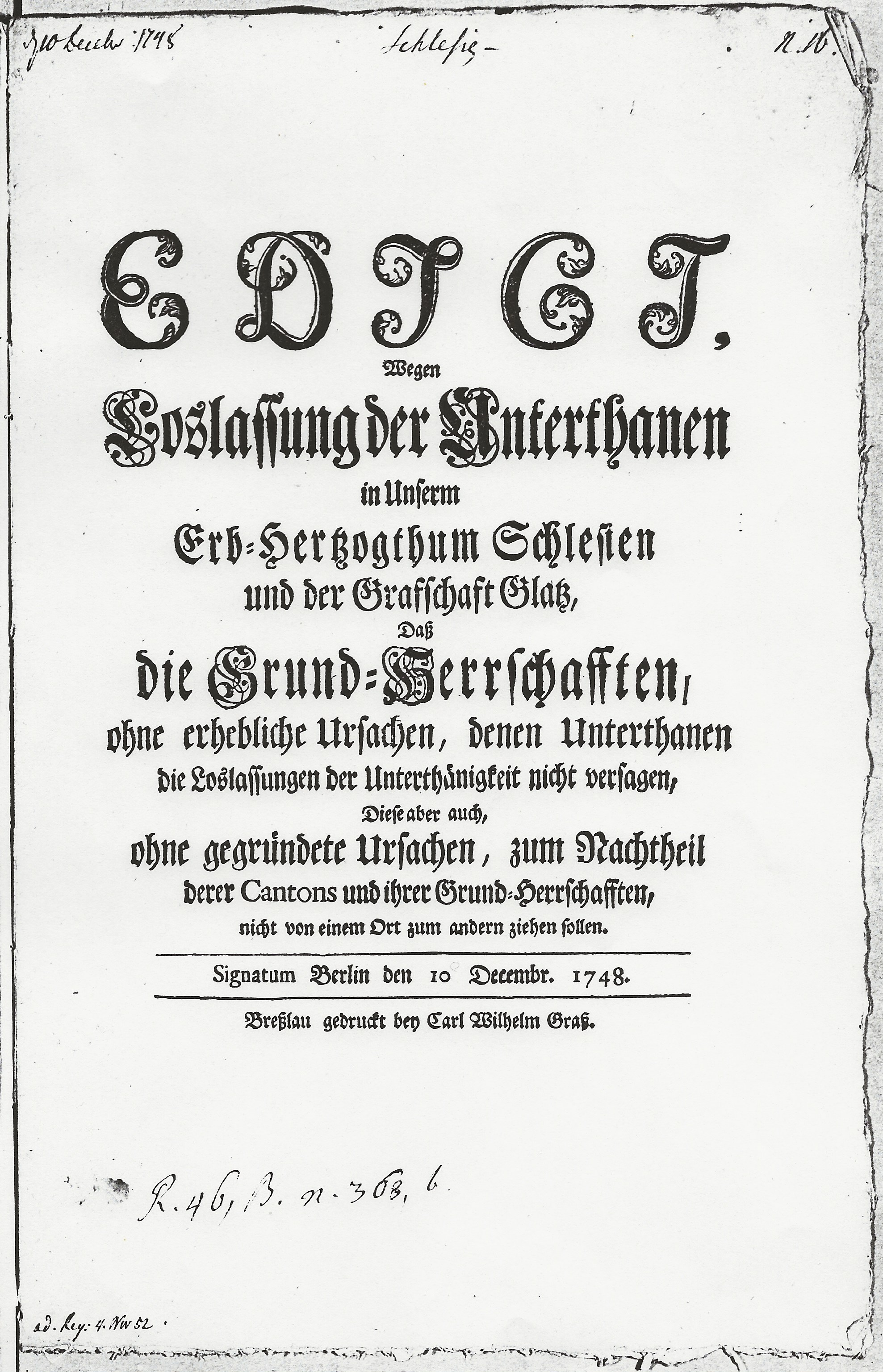 Das Edigt regelte die Loslassung der Untertanen in Schlesien u. Glatz im 18. Jhrh.